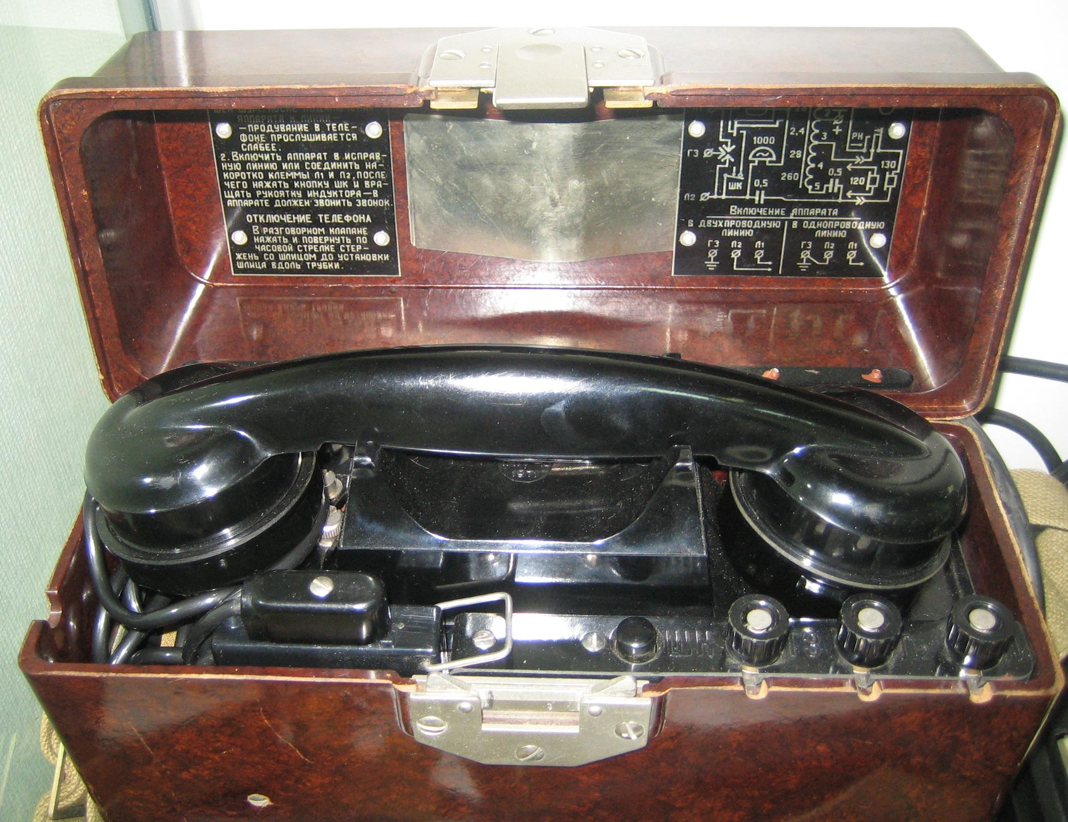 военно-полевой телефон ТАИ-43, образца 1943г., 1971 г.в.